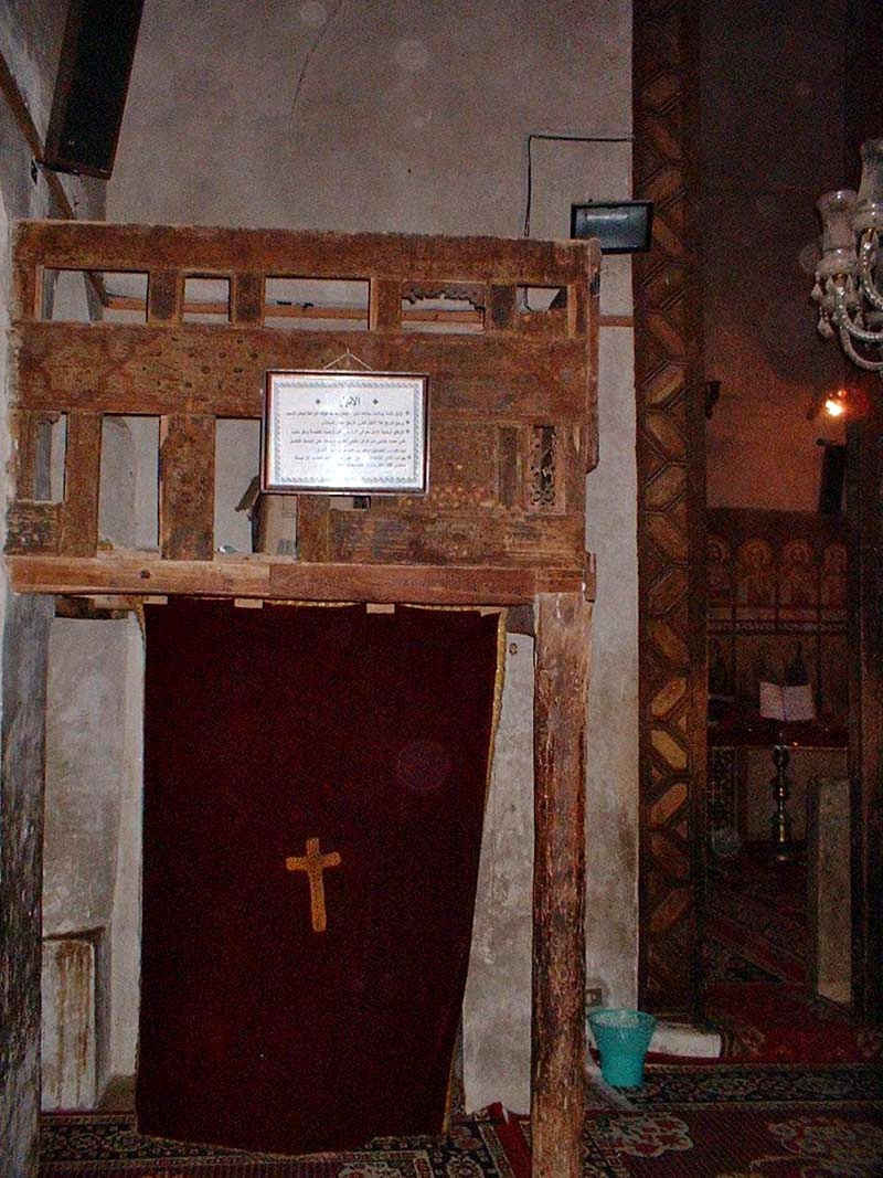 إنبل (منبر) كنيسة الأنبا بيشوي بدير الأنبا بيشوي الذي يستخدم في الوعظ، وادي النطرون